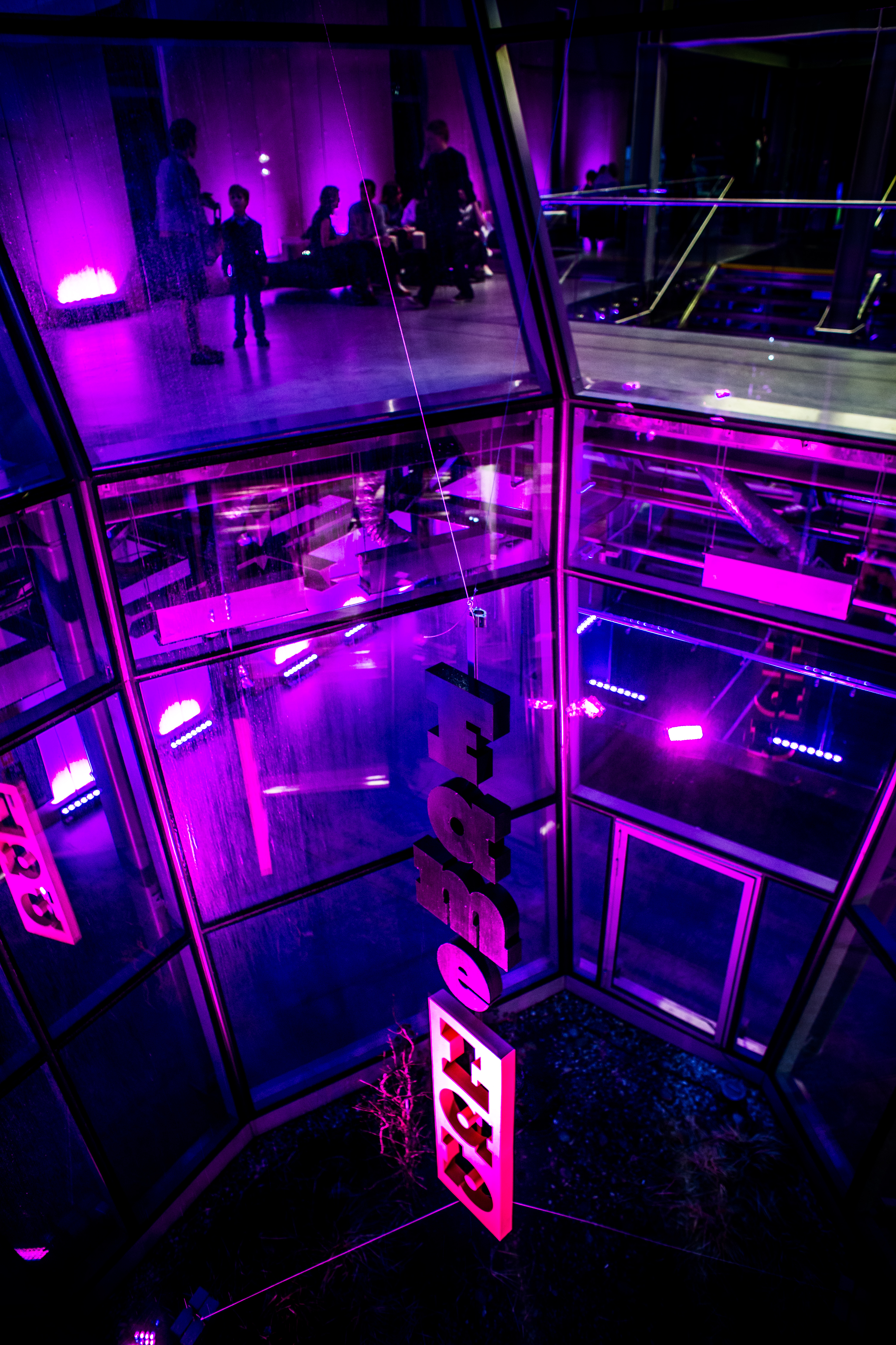 16.04.2016 WARSZAWA CENTRUM NAUKI KOPERNIK FINAL FAMELAB 2016 FOT. ADAM KOZAK/MEDIAFOT/ DLA CENTRUM NAUKI KOPERNIK